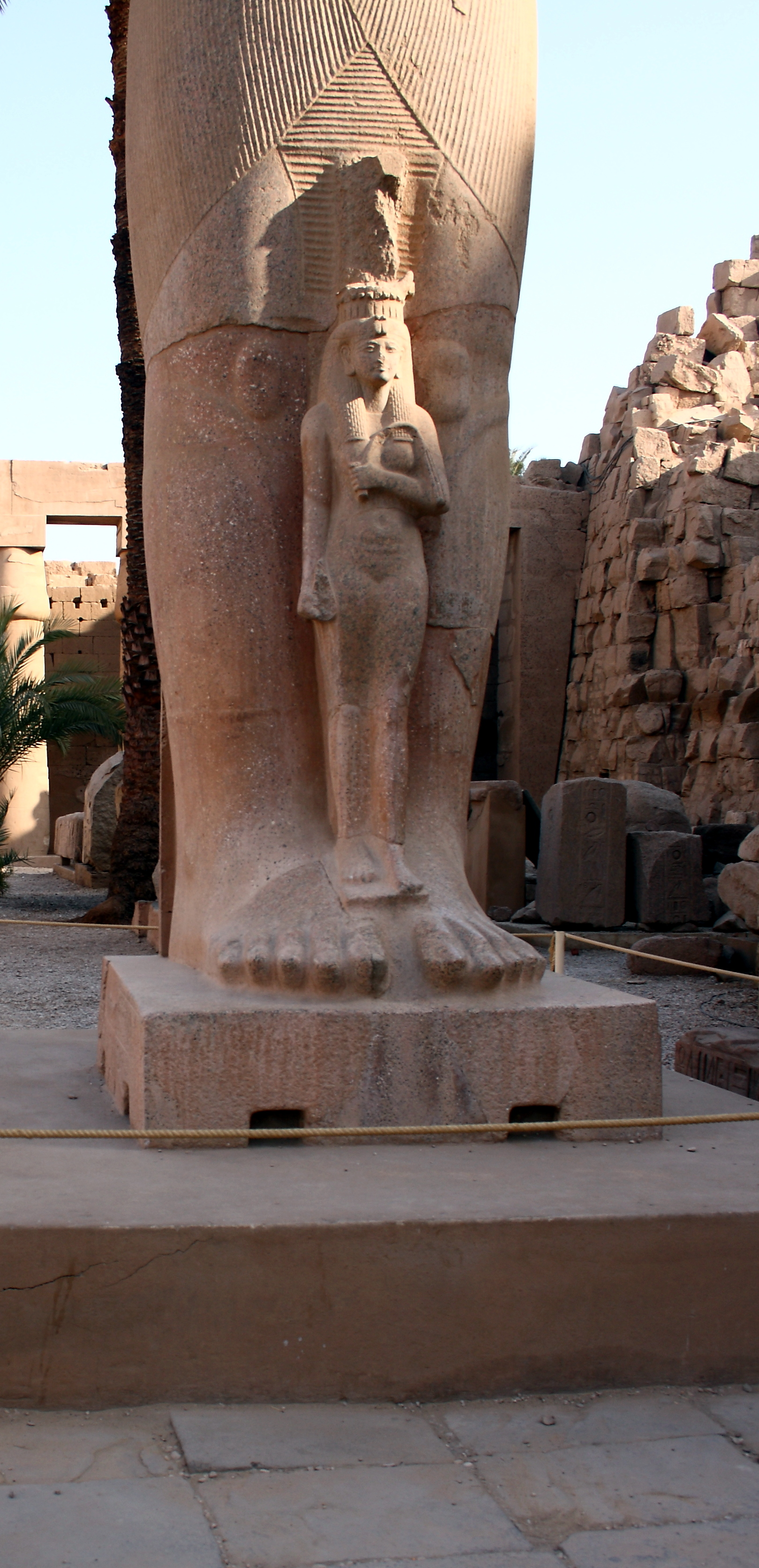 Karnak_temple of Amun-Ra: Tochter von Pinudjem I., zwischen den Knien des Vaters